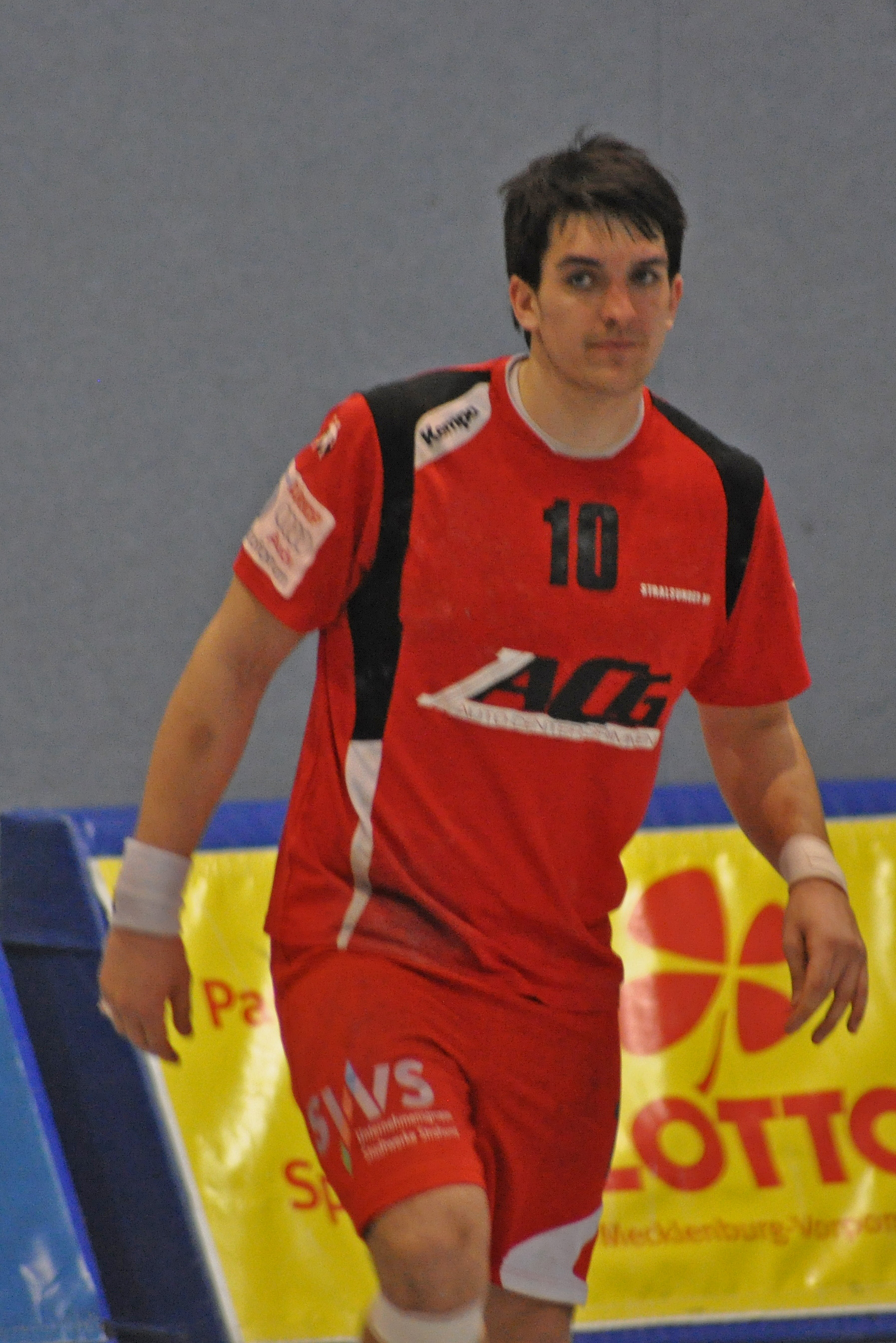 Bild aufgenommen beim Spiel in der 3. Liga (DHB) zwischen dem Stralsunder HV und dem HSV Insel Usedom am 23. März 2013 in der Stralsunder Vogelsanghalle. Das Speil endete 30:29 für den Stralsunder HV.